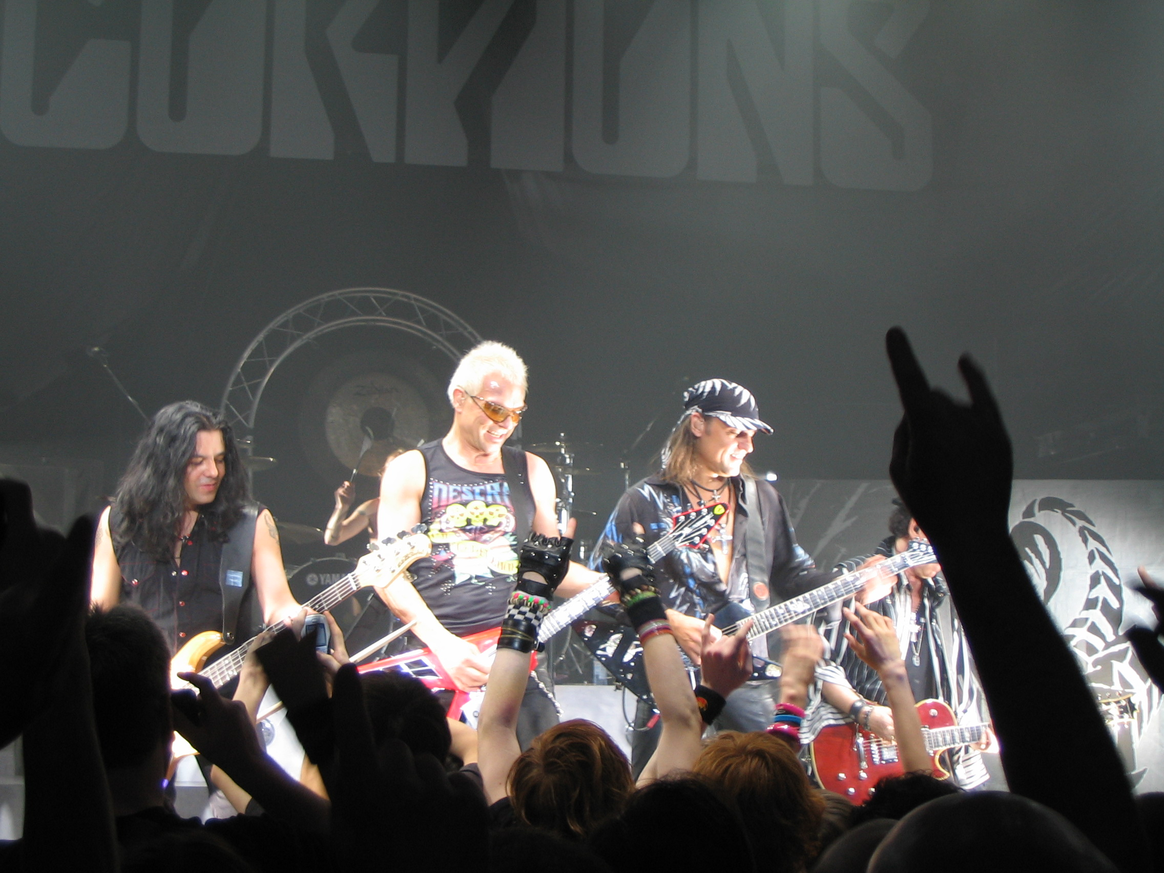 Matthias Jabs, Klaus Meine, Ralph Rieckermann and Rudolf Schenker of Scorpions.